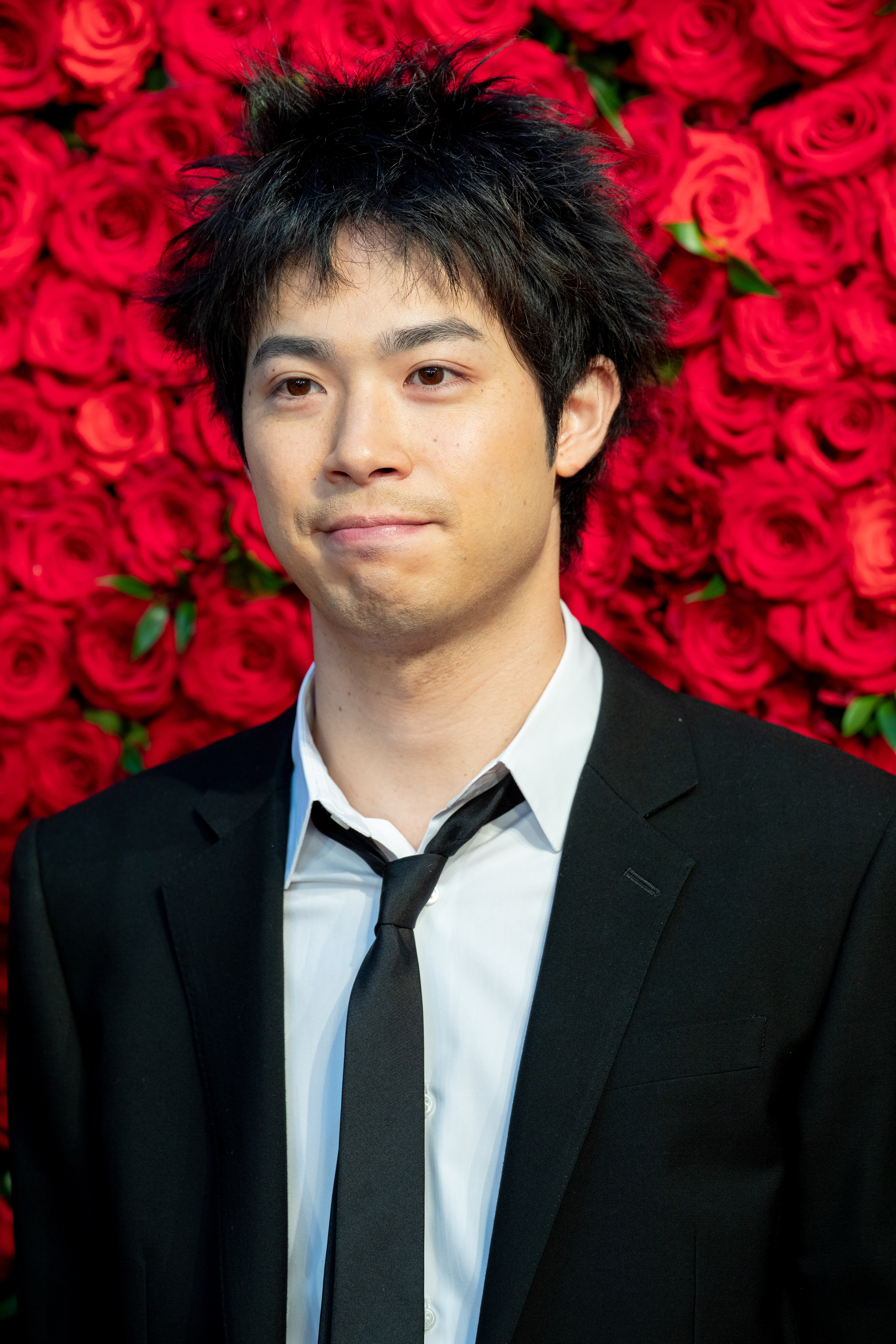 第30回 東京国際映画祭 オープニングセレモニー 渡辺大知 (ギャングース)